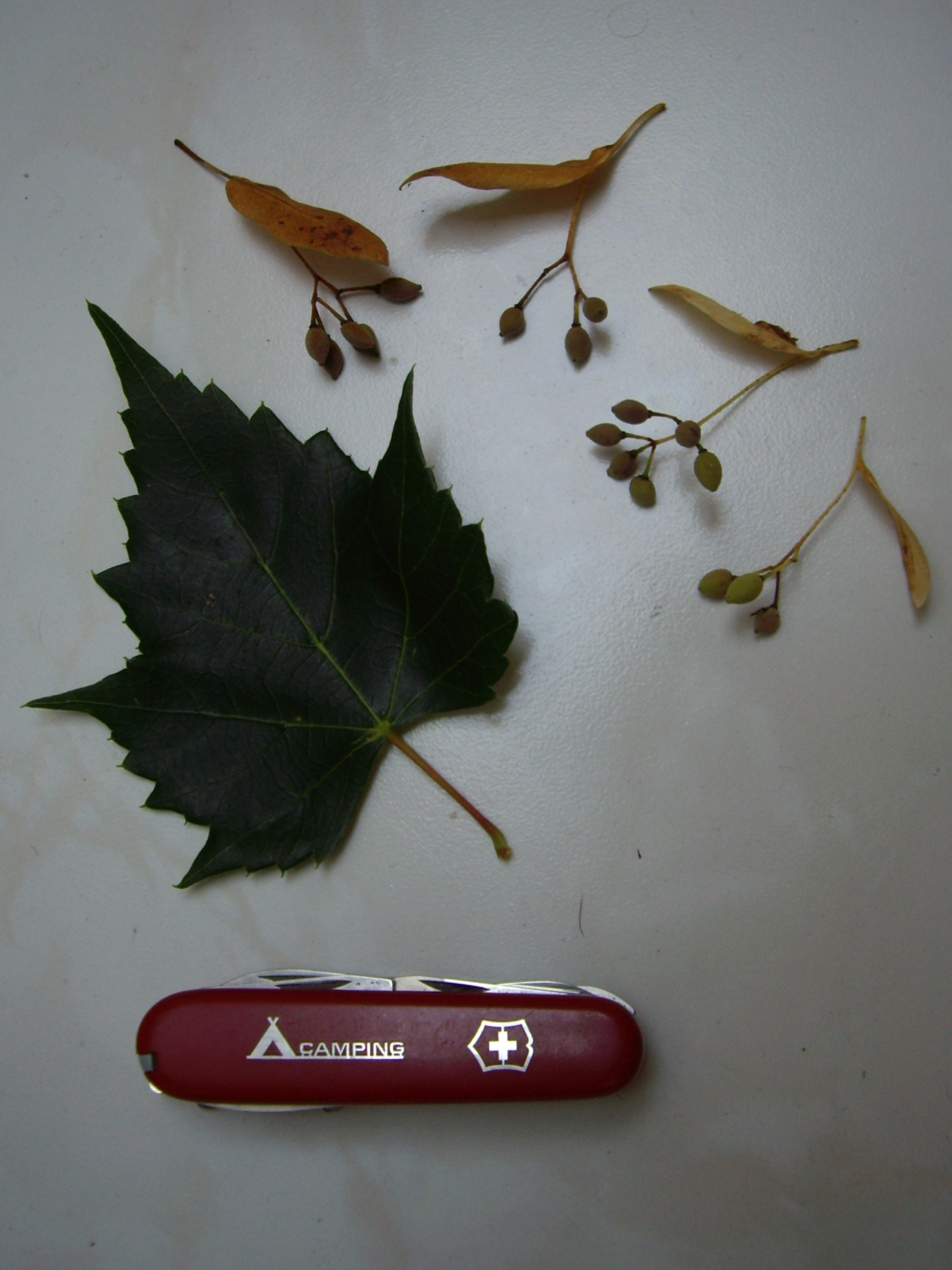 Früchte und Blütenstände von Tilia mongolica – Straßenbaum in der Nähe des Wensum River, Norwich, UK.